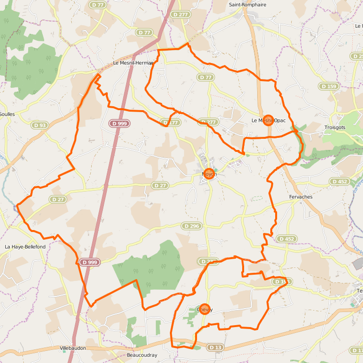 Carte de Moyon village , commune nouvelle